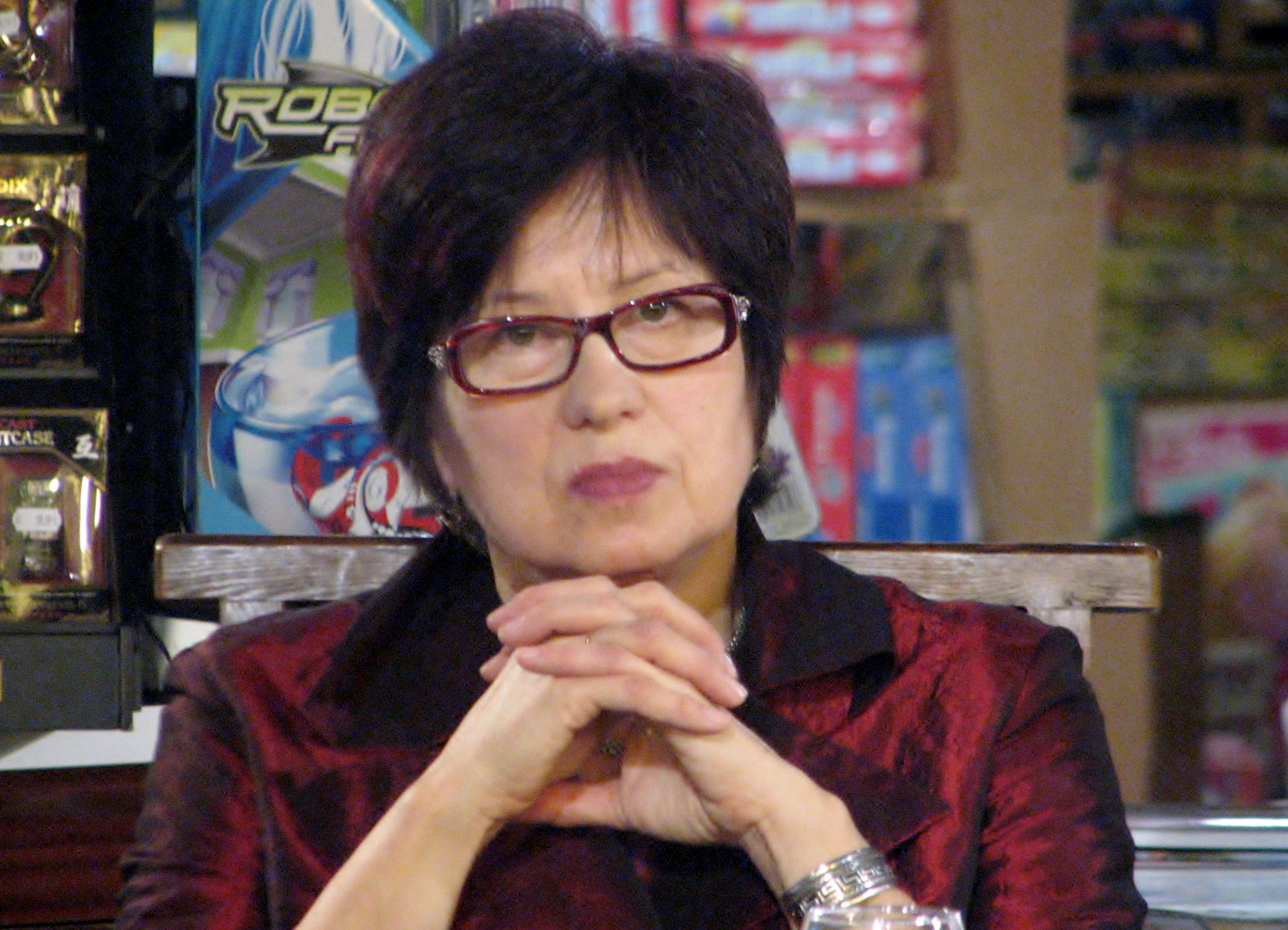 Aita Kivi Malle Pärna raamatu "Minu elu hetked" esitlusel